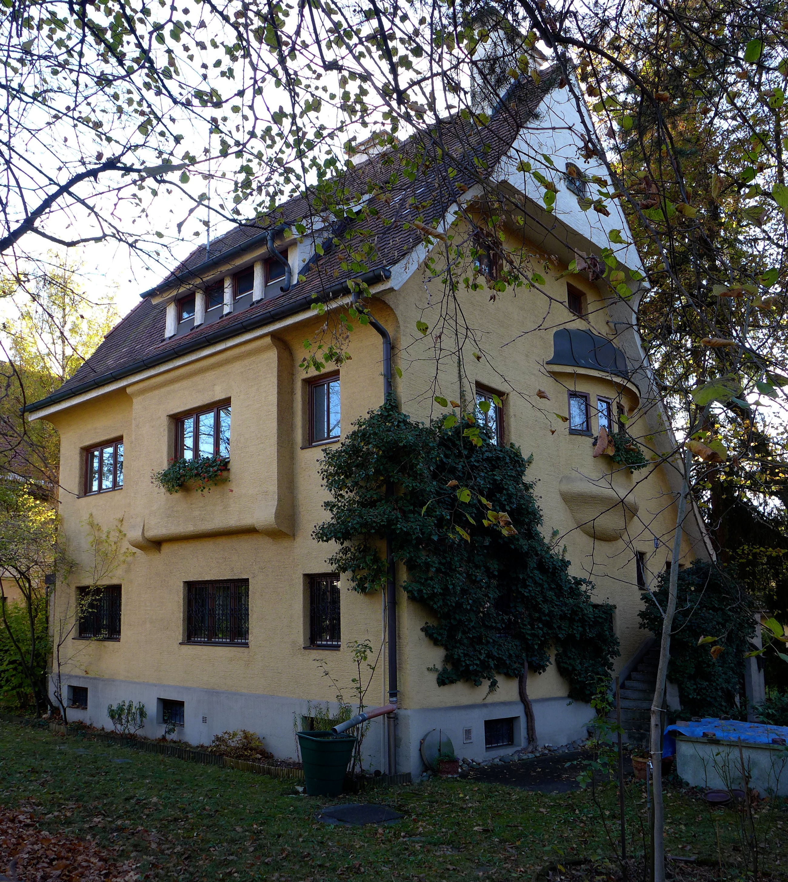 Marsopstr 18, München